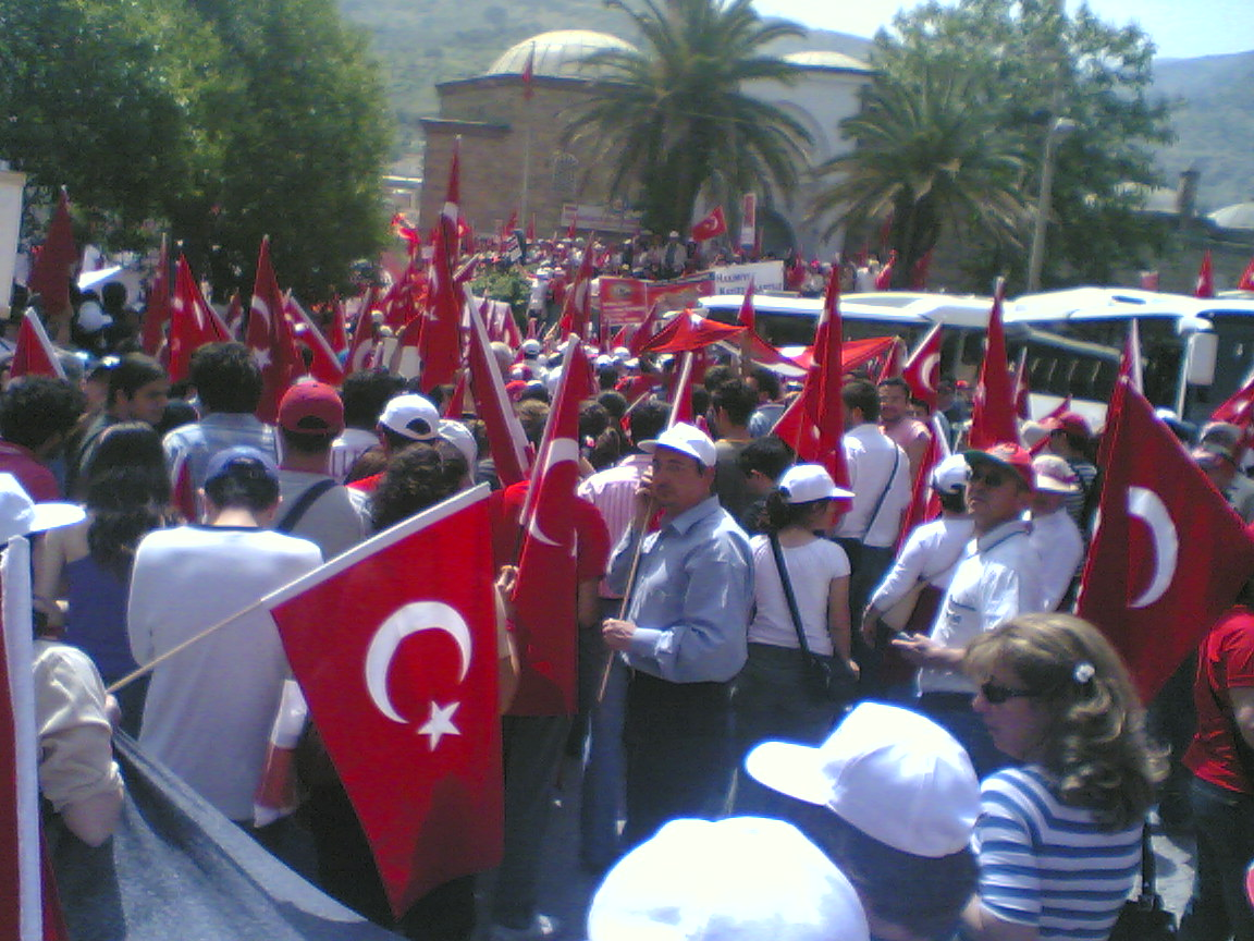 Republic protest, Manisa